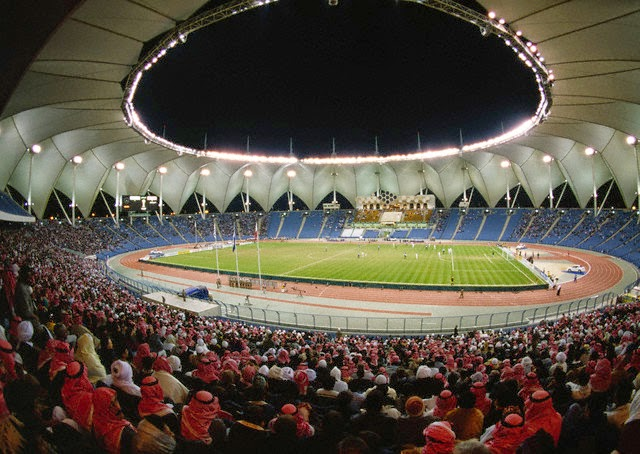 Estádio Internacional Rei Fadh